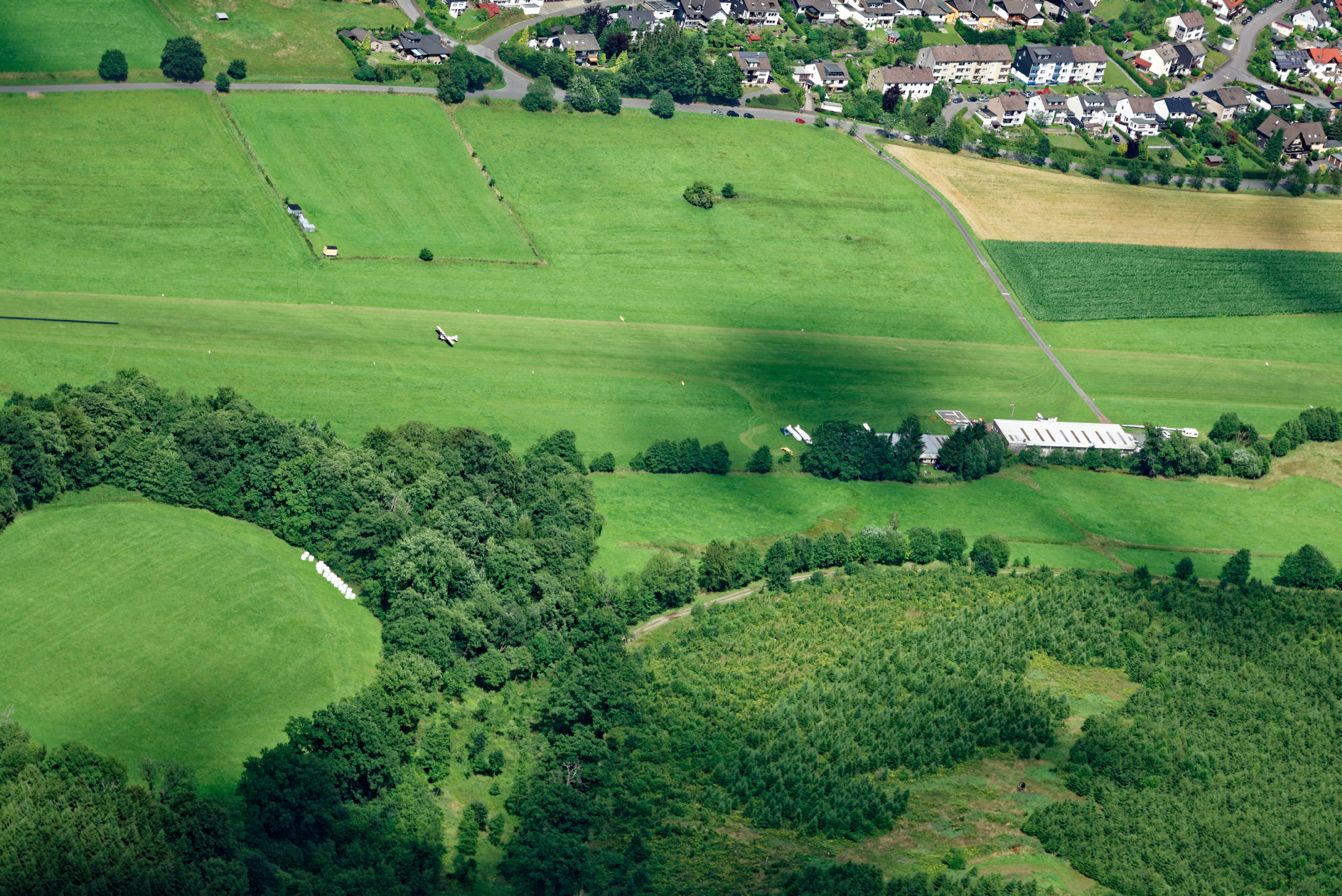 Fotoflug Sauerland West. Luftaufnahme: Flugplatz Plettenberg-Hüinghausen südwestlich des Herscheider Ortsteils Hüinghausen, Nordrhein-Westfalen.